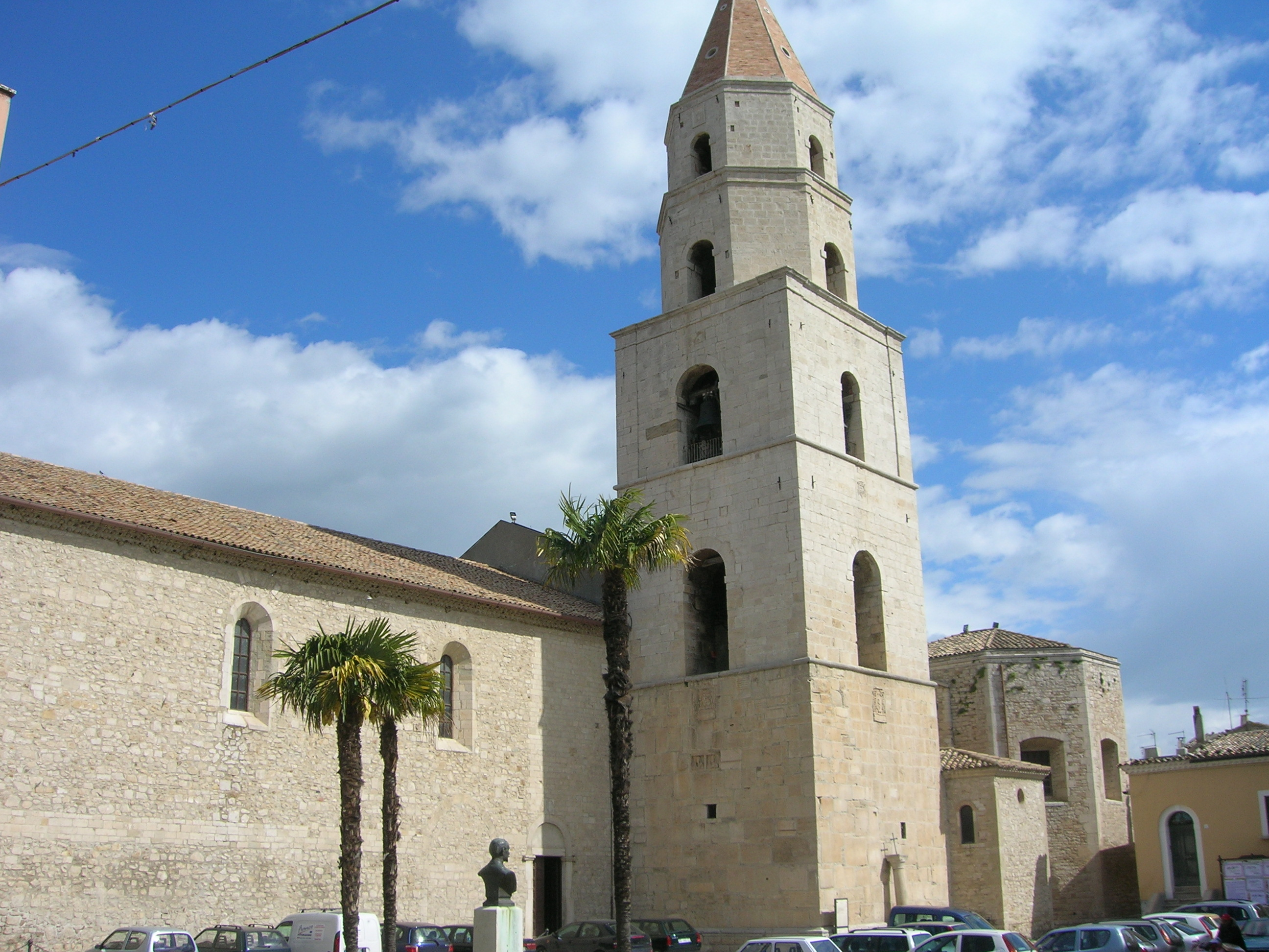 Cattedrale di Sant'Andrea, Venosa (PZ)